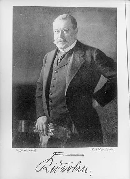 Fonte: Biblioteca del Congresso degli Stati Uniti. Descrizione: Alfred von Kiderlen-Waechter Ministro degli Esteri tedesco dal 1910 al 1912. Digital ID: hec 04710 Source: digital file from original negative Reproduction Number: LC-DIG-hec-04710 (digital file from original negative) Repository: Library of Congress Prints and Photographs Division Washington, D.C. 20540 USA